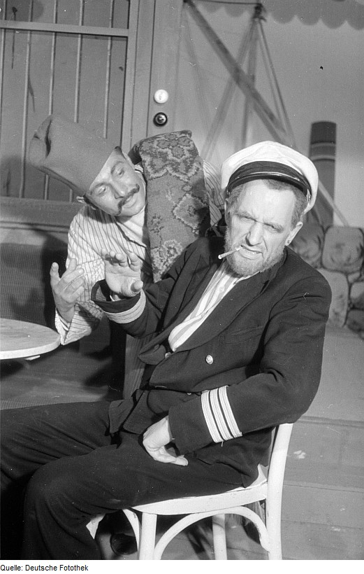 Original image description from the Deutsche Fotothek Szenenbilder & PorträtArthur Schröder (rechts), in der Rolle des Escartefigue